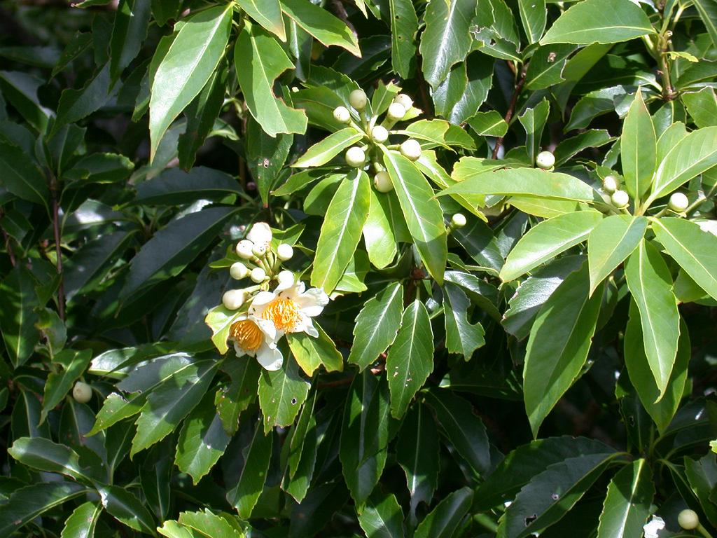 Schima superba：イジュ 2006/08/10 沖縄本島北部 Okinawa Island